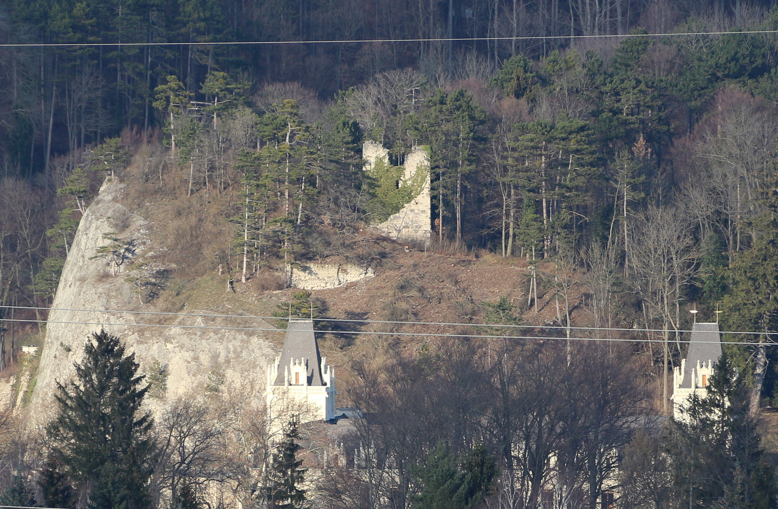 Ruine Hernstein oberhalb des Schlosses in Hernstein, Niederösterreich.